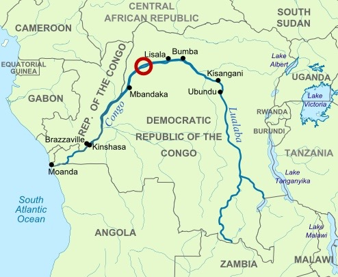 კუნდუ